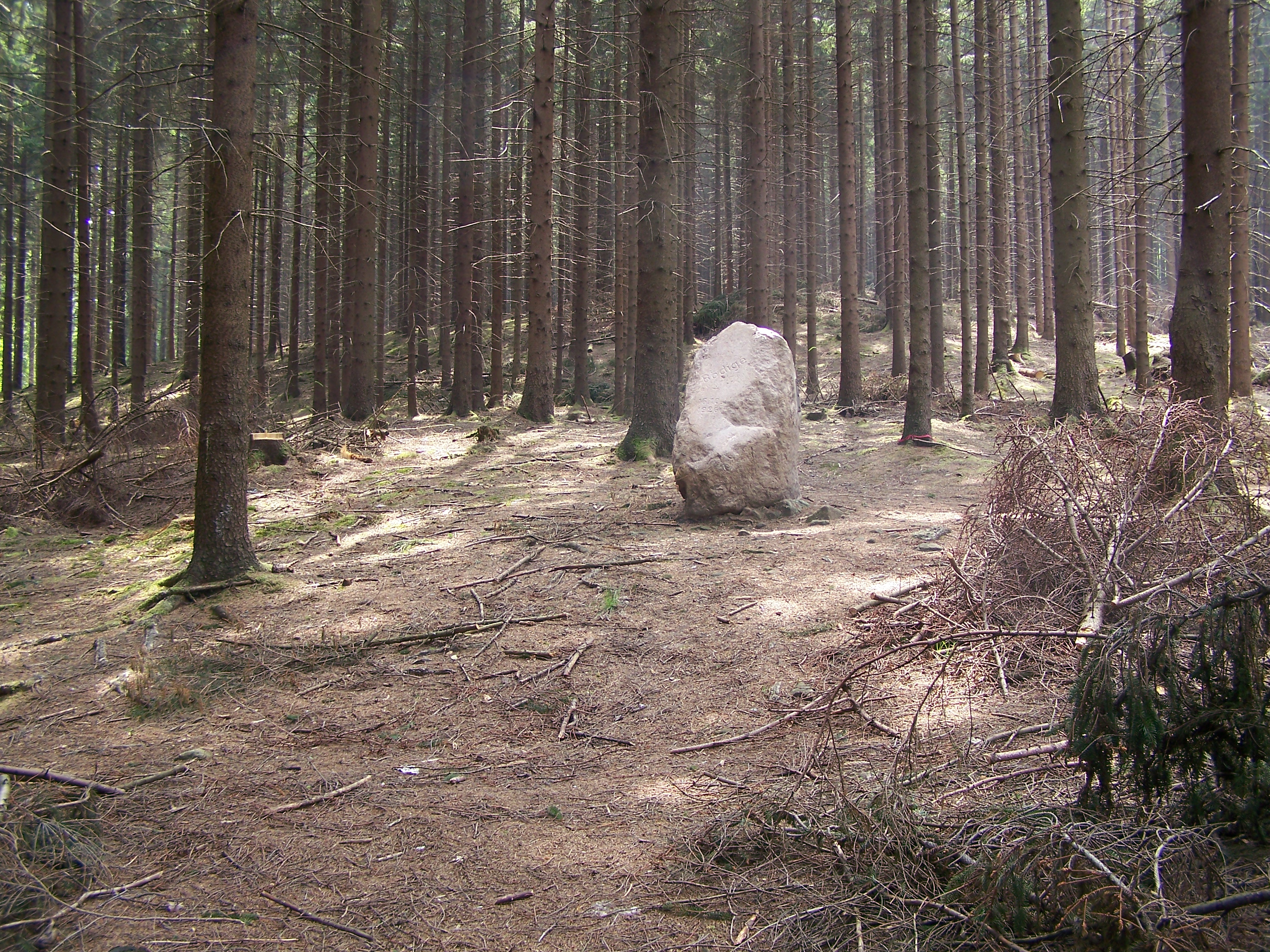 Bödige-Stein im Hüggel. Der Natur- und Heimatforscher Dr. phil. Nikolaus H. Bödige starb an dieser Stelle am 16.10.1926